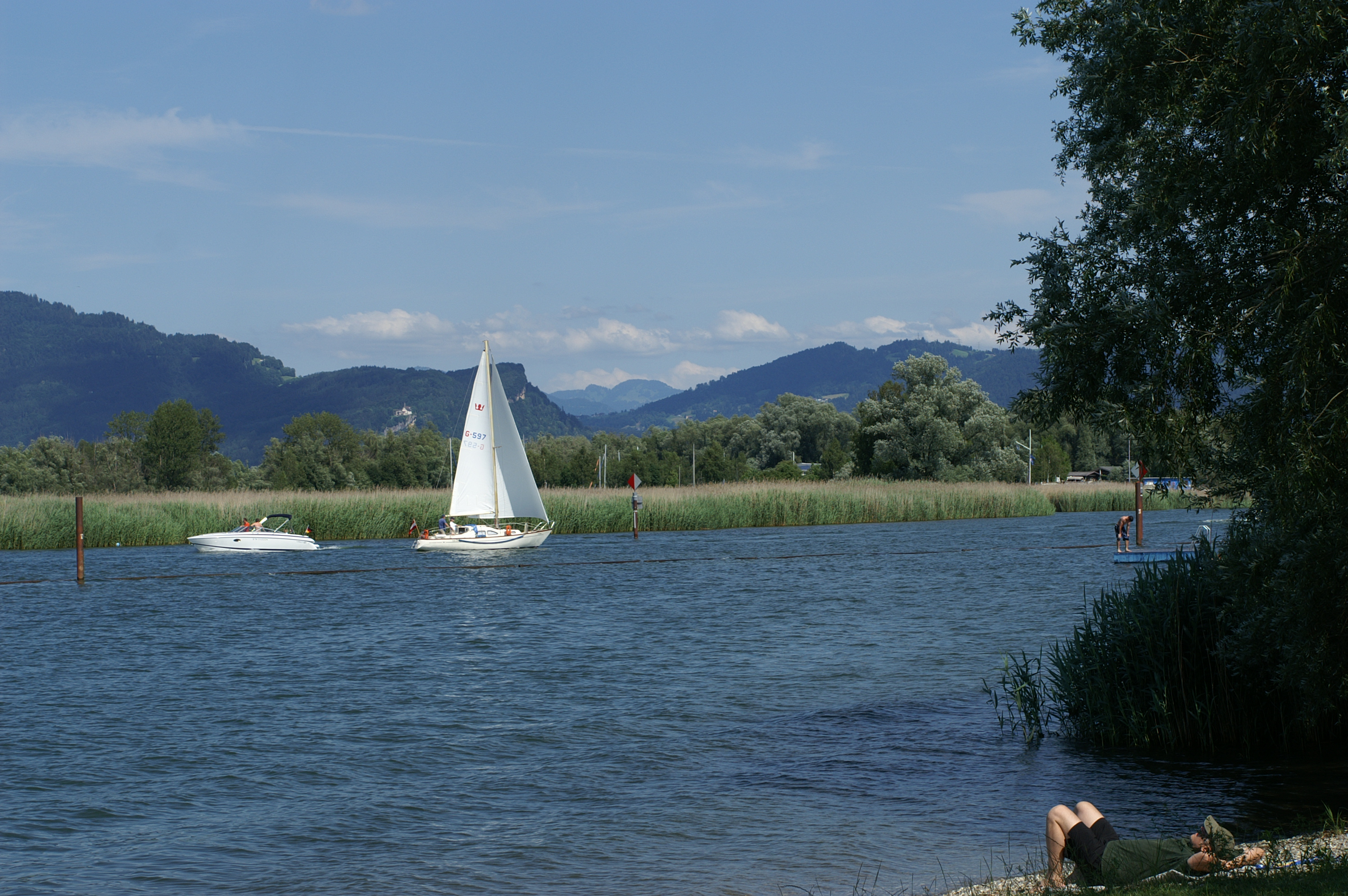 Fußach Blick vom Hörnlebad über die Hafeneinfahrt in den vorderen Bregenzerwald.